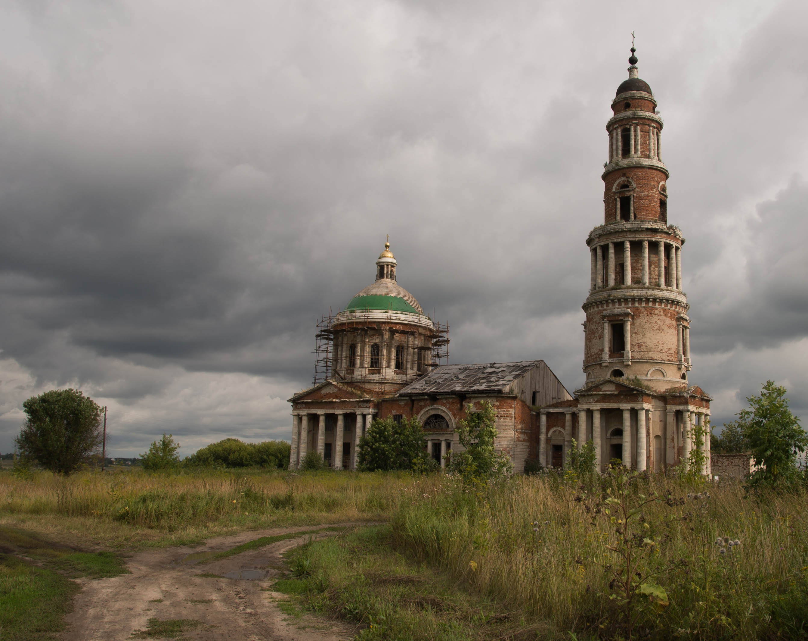 Церковь Рождества Пресвятой Богородицы (Рязанская область, Спасск-Рязанский, село Перевлес)